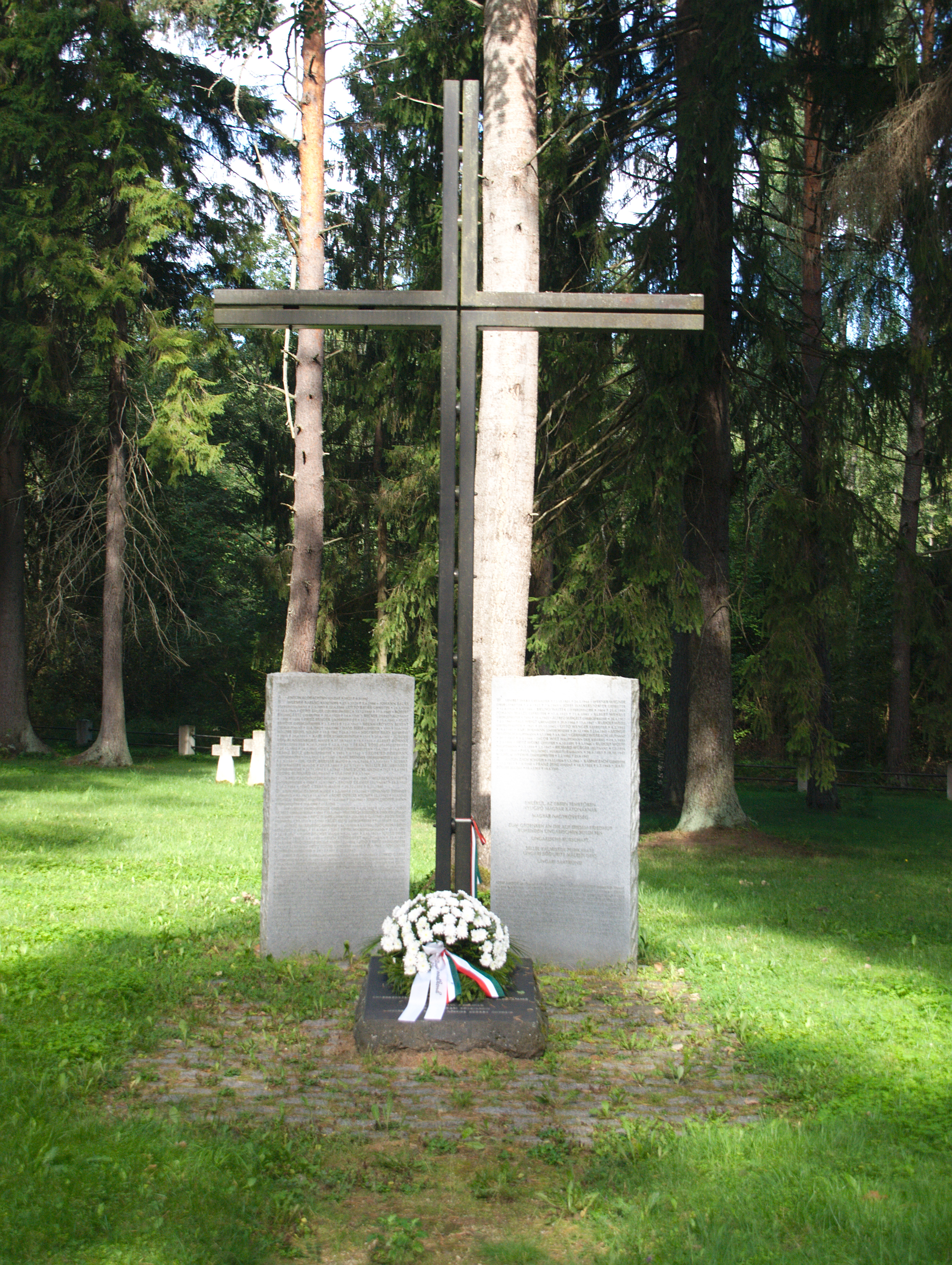 Valga vangilaagri kalmistu